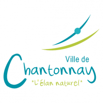 Logo de la Ville de Chantonnay réalisé par Hermine Communication - Laurent Poultier du Mesnil